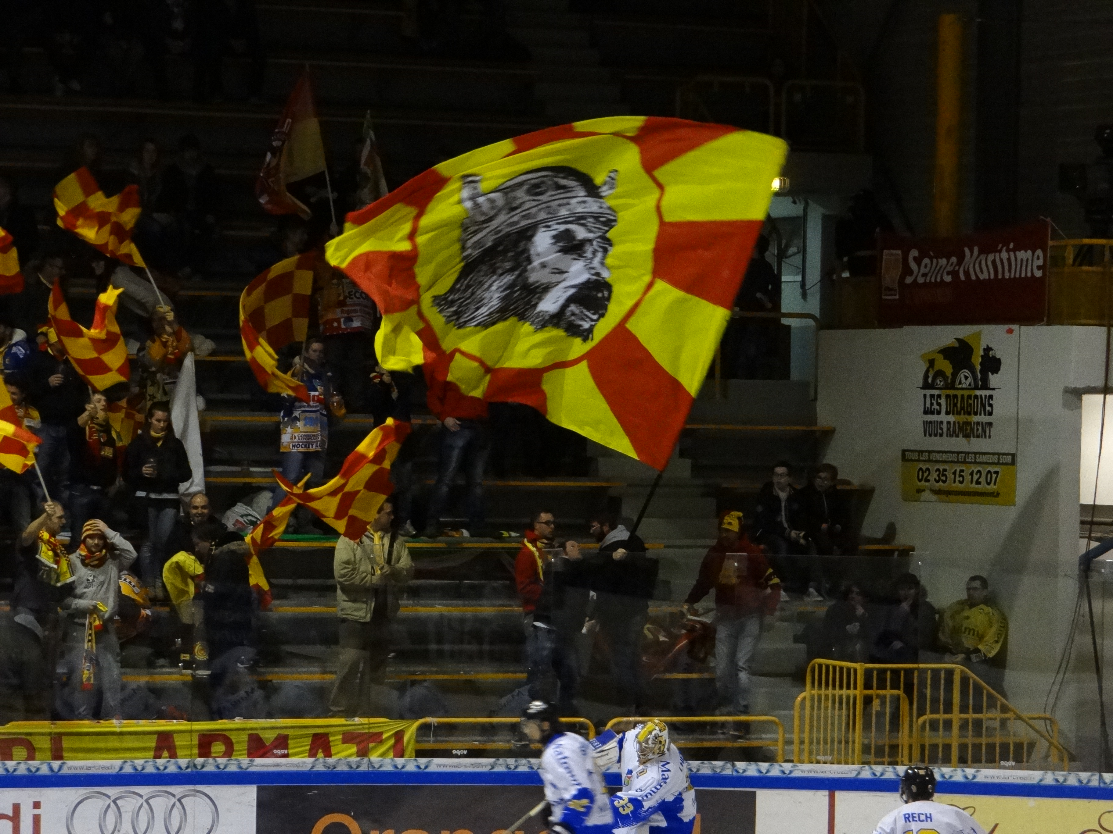 Coupe Continentale de hockey 2014 à Rouen - supporters de Asiago